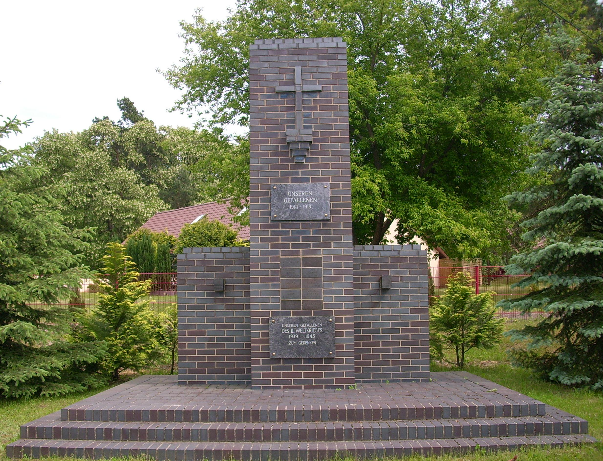 Kriegerdenkmal für die Gefallenen des Ersten und Zweiten Weltkriegs in Burg (Spreetal)